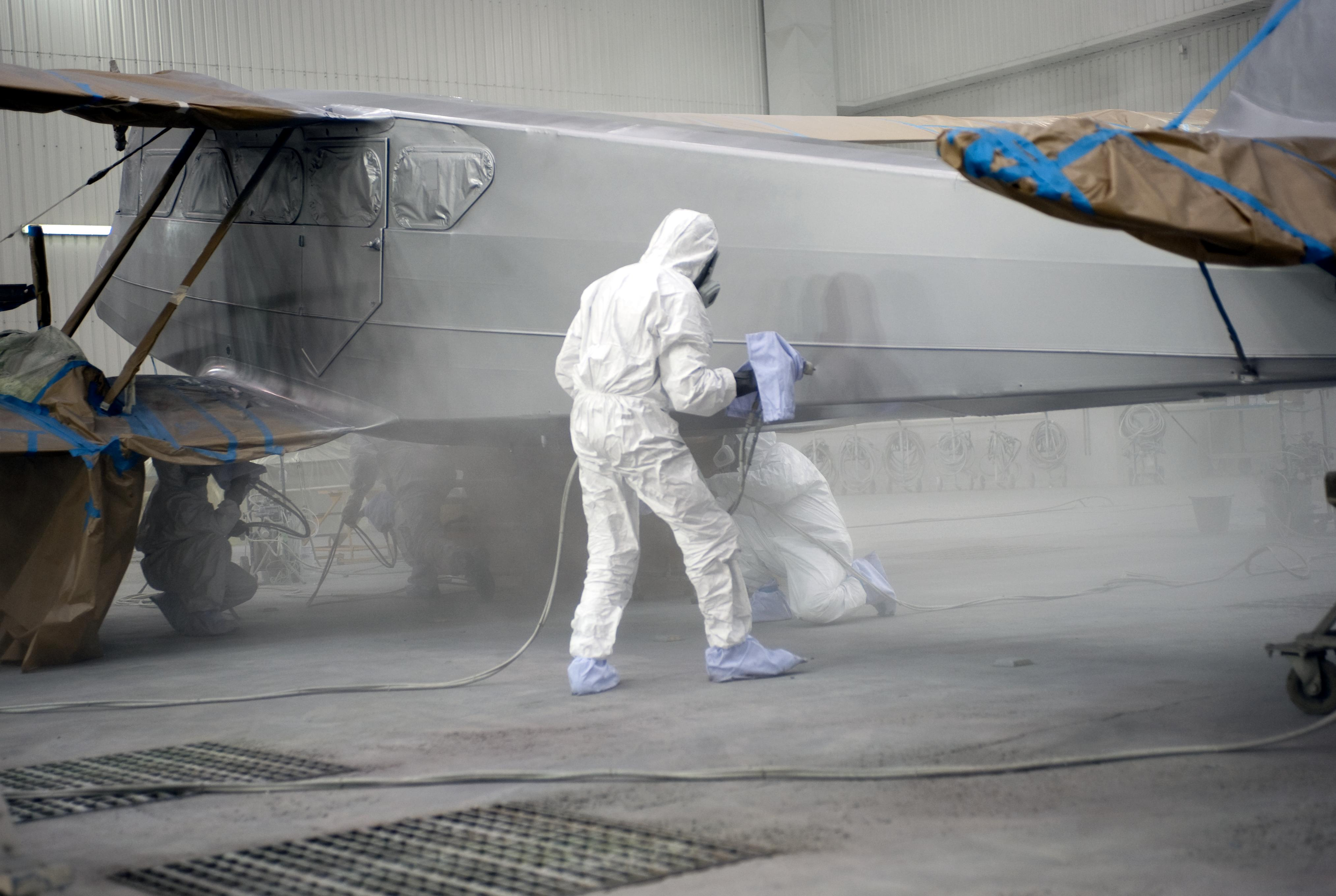 El equipo de Iberia trabajando en la pintura del Dragon Rapide con los colores de Iberia. Dragon Rapide Iberia team painting on the airline's colors. Durant les travaux de peinture et de restauration à La Muñoza par l'équipe d'Iberia. Il team Iberia lavorando e pitturando il Dragon Rapide. Das Team bei der Malarbeit des Dragon Rapide mir den Farben von Iberia.